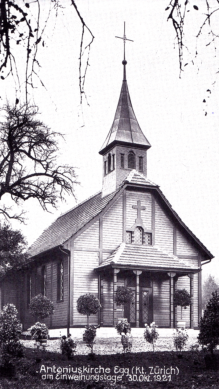 Römisch-katholische Pfarrkirche St. Antonius Egg bei der Einsegnung 1921